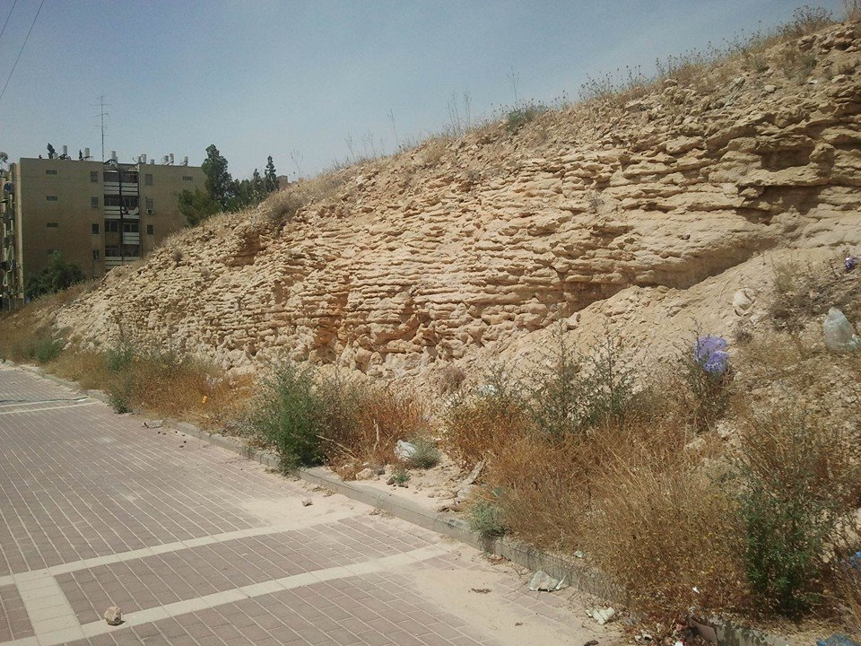 סלעי כורכר בעיר באר שבע, המצביעים על קיומו של ים קדמון בעיר, שהרי סלעי כורכר נמצאים רק בקרבת ים.